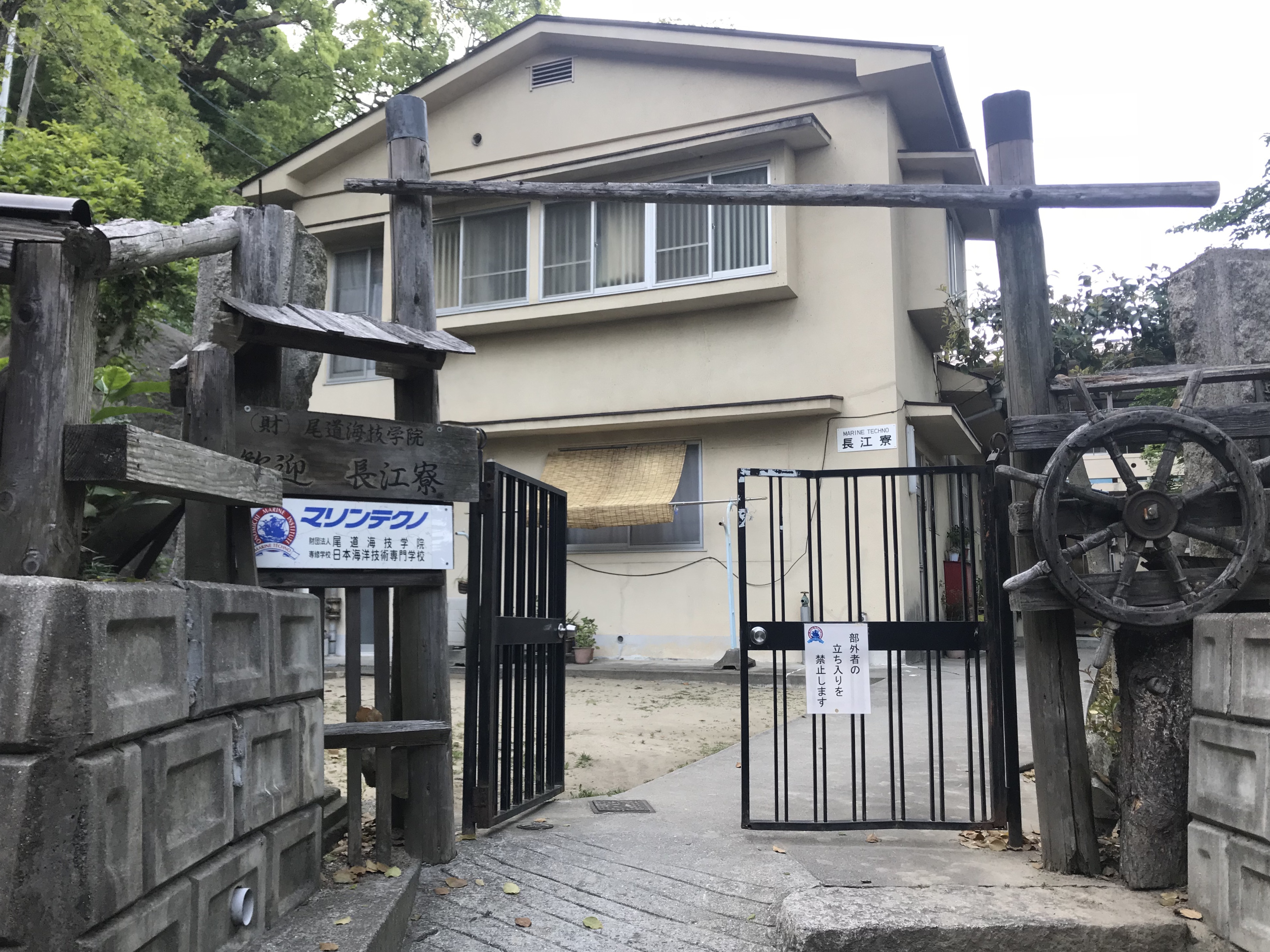 尾道海技学院長江寮